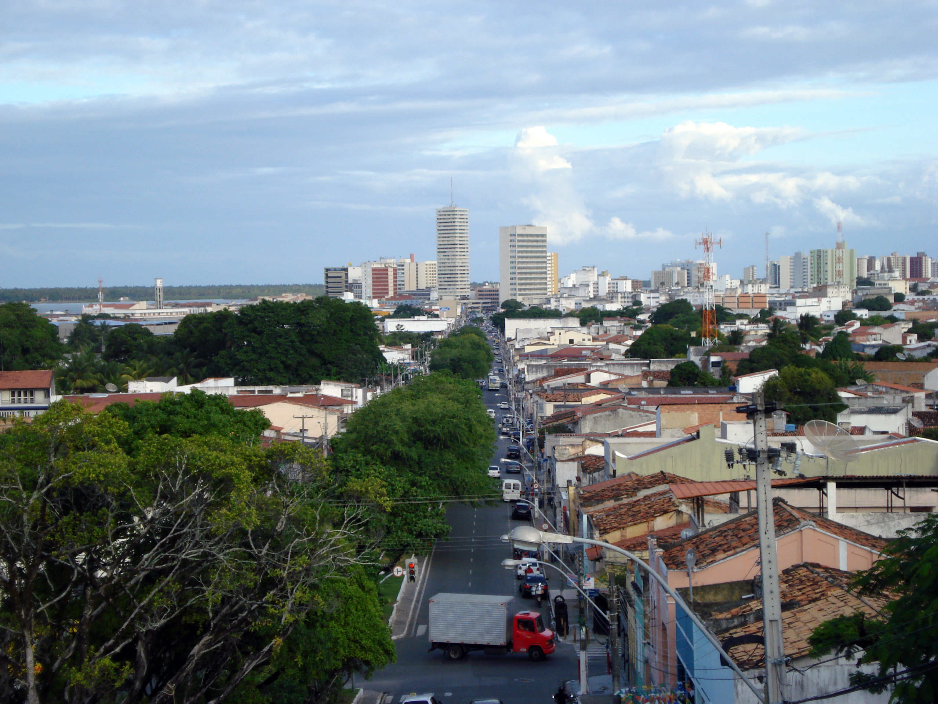 Imagem de Aracaju/SE/Brasil.